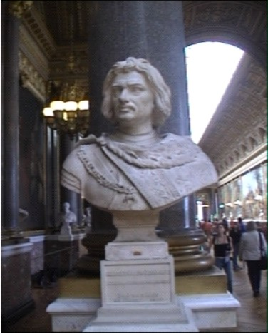 buste de Charles le Téméraire, dans la galerie des batailles du château de Versailles